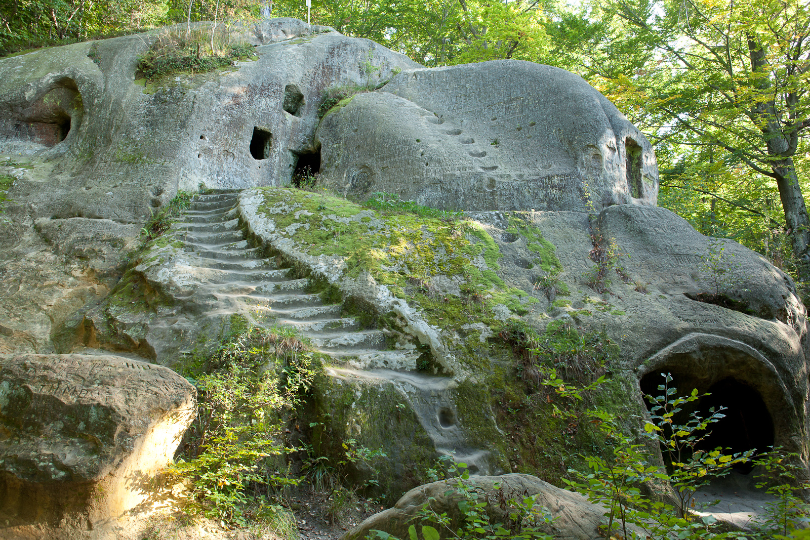 Скельний монастирський комплекс коло села Розгірче Стрийського району Львівської області.